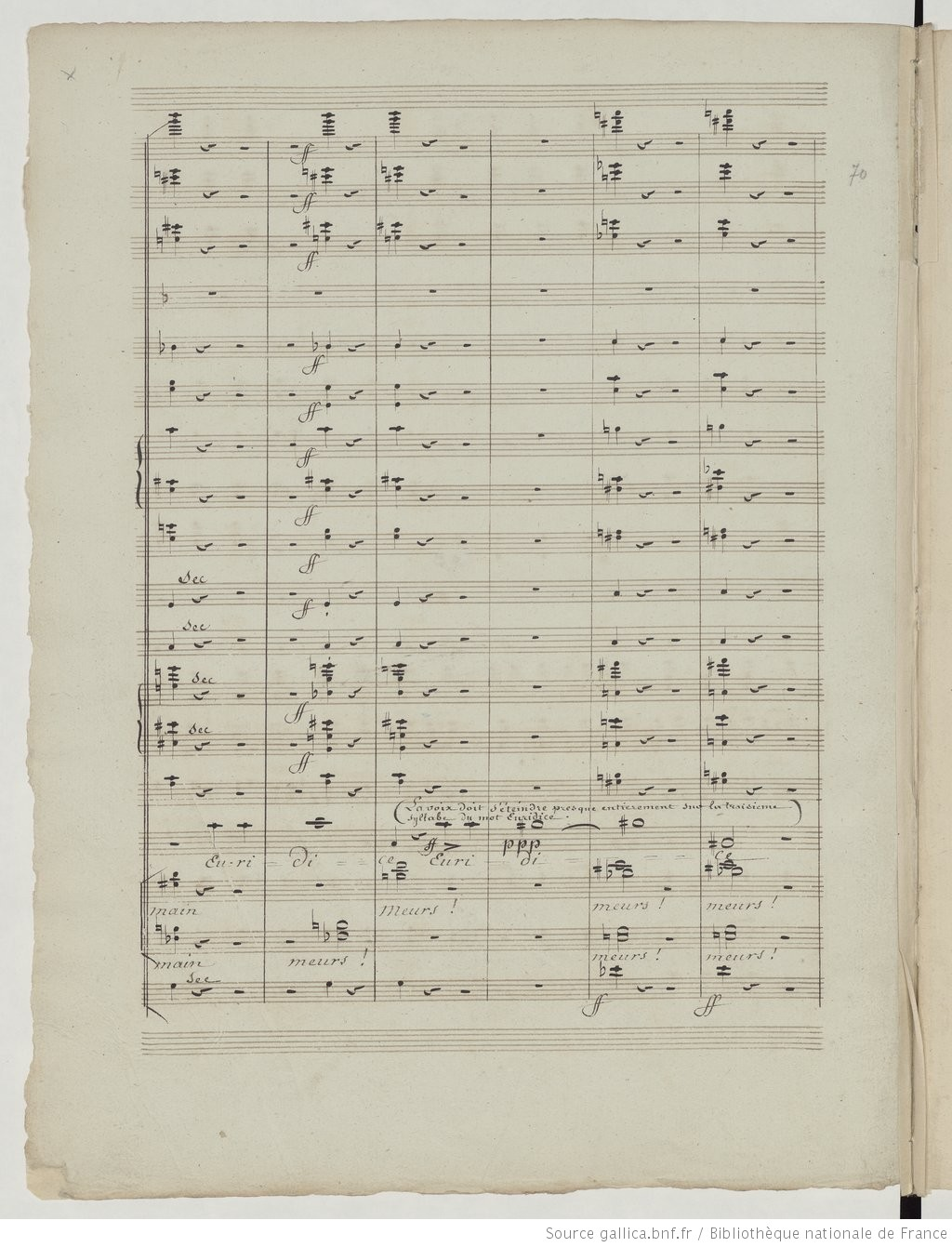 Page manuscrite du passage de la mort d'Orphée, dans "La mort d'Orphée" d'Hector Berlioz, cantate pour le prix de Rome, 1827